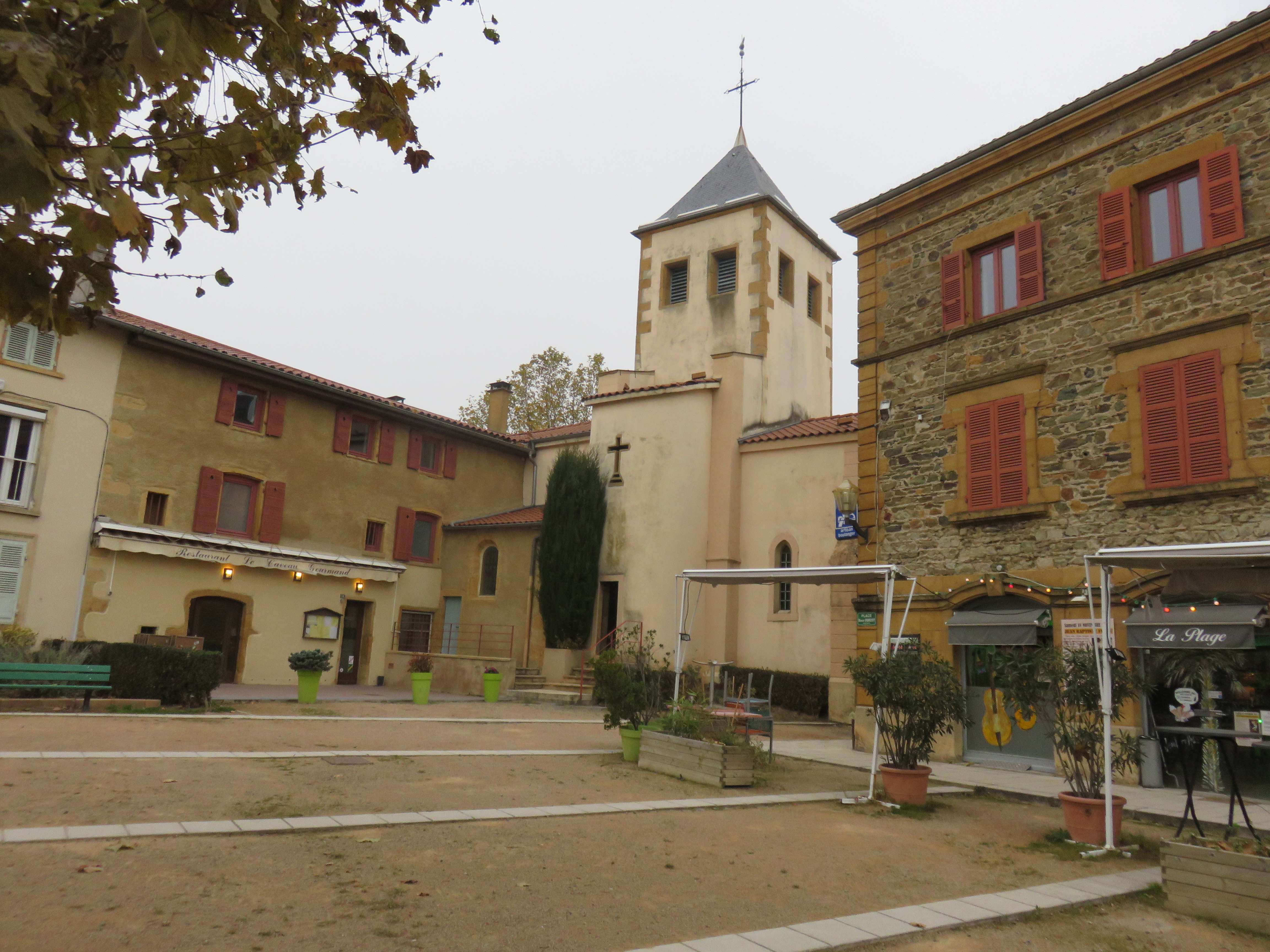 Place Benoit Dubost, avec l'église Saint-Barthélémy de Fleurieux-sur-l'Arbresle (Rhône, France).